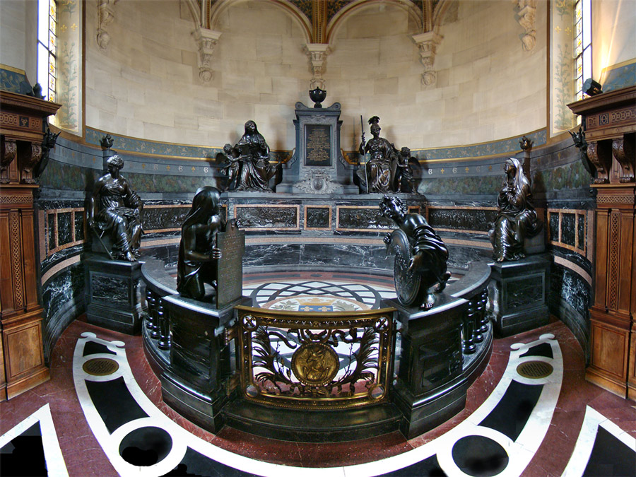 Château de Chantilly, Oise, Picardie, France. La chapelle des Cœurs des princes de Condé.